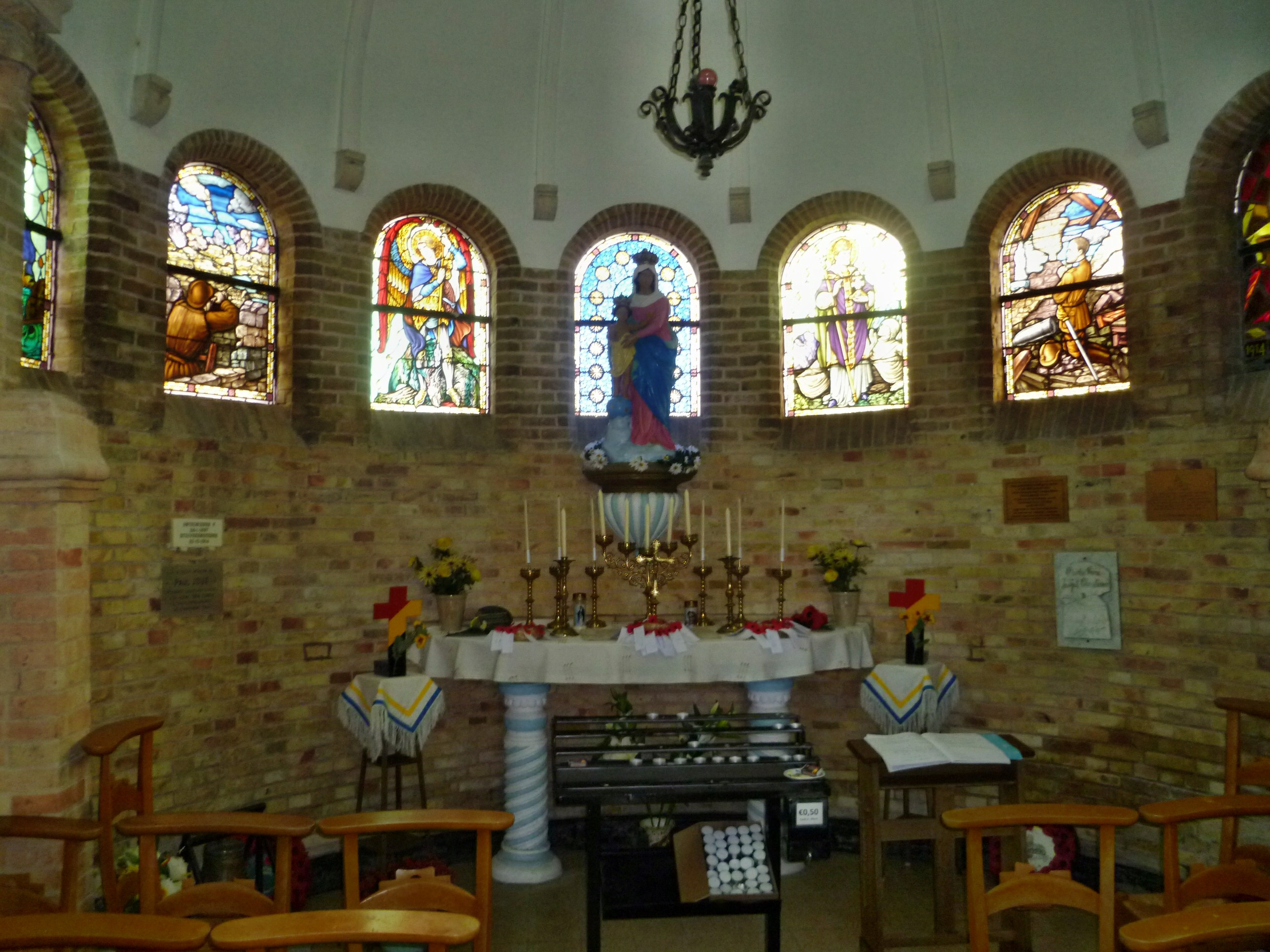 Onze-Lieve-Vrouwhoekje in Stuivekenskerke (Diksmuide), Belgische artillerieobservatiepost gedurende de Eerste Wereldoorlog; plaats waar de Duitsers tot staan werden gebracht.